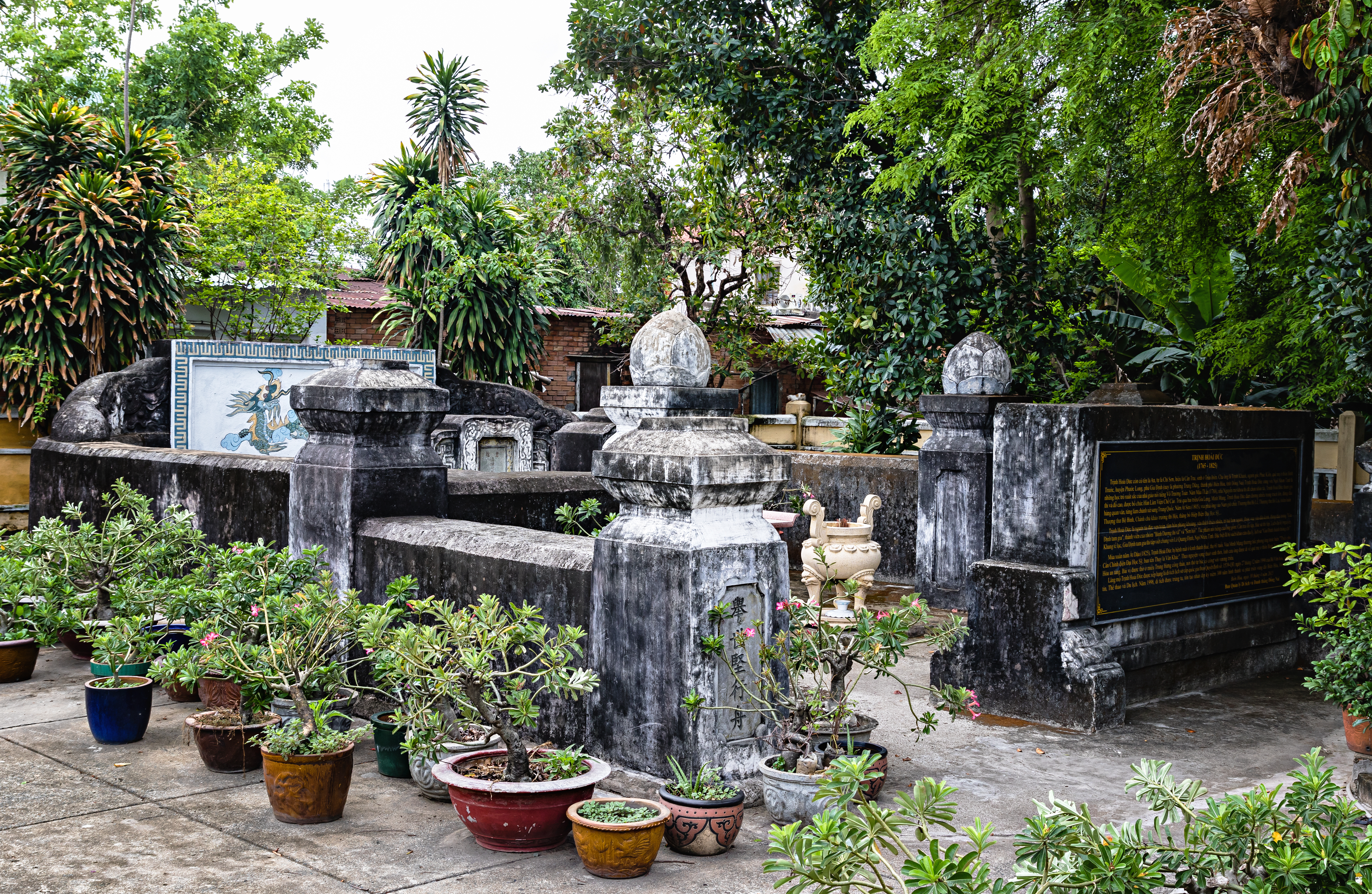 Mộ danh thần Trịnh Hoài Đức (1765 - 1825) ở tại TP Biên Hòa, Việt Nam.